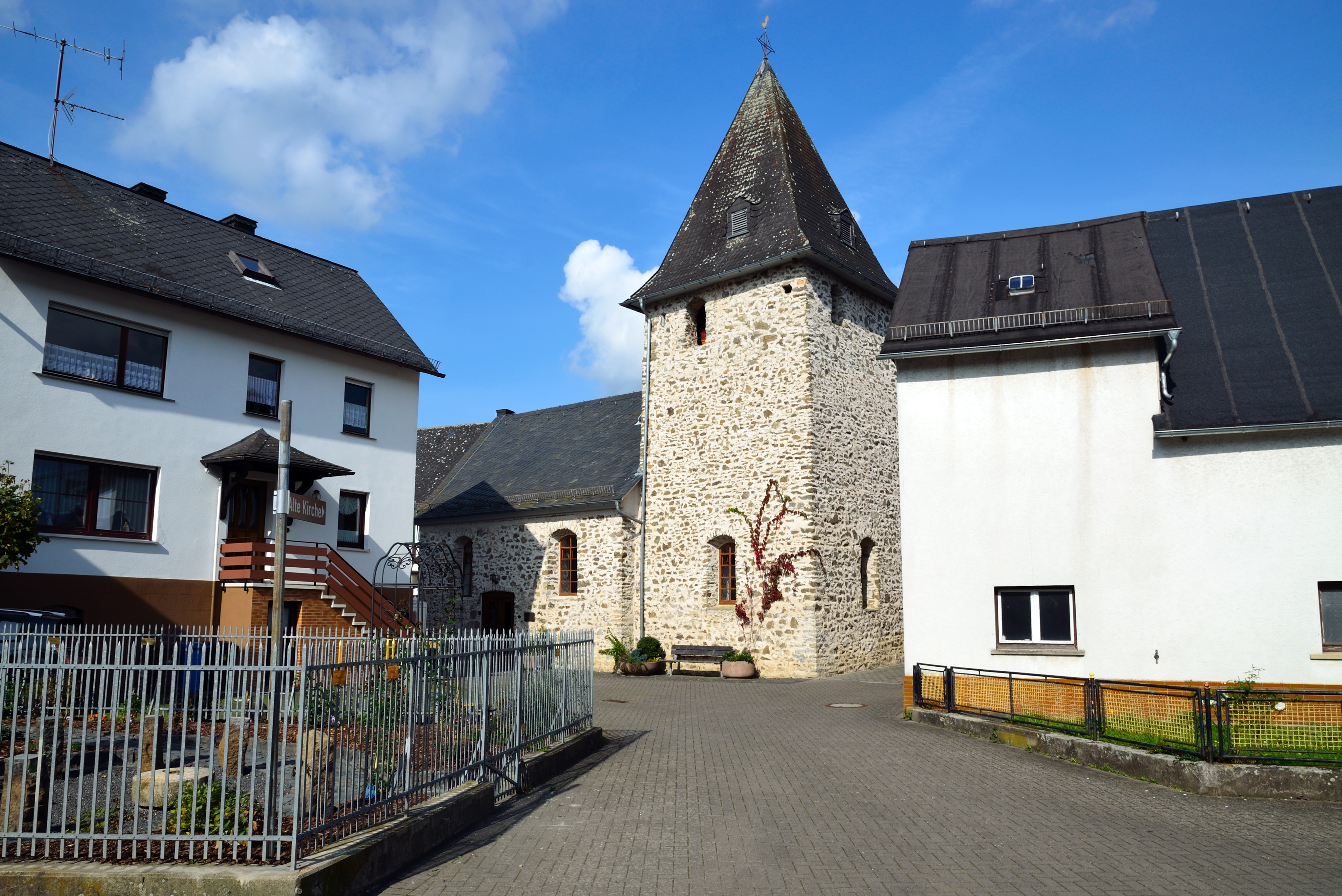 Die ehemalige ev. Kirche Am Damm in Bischoffen